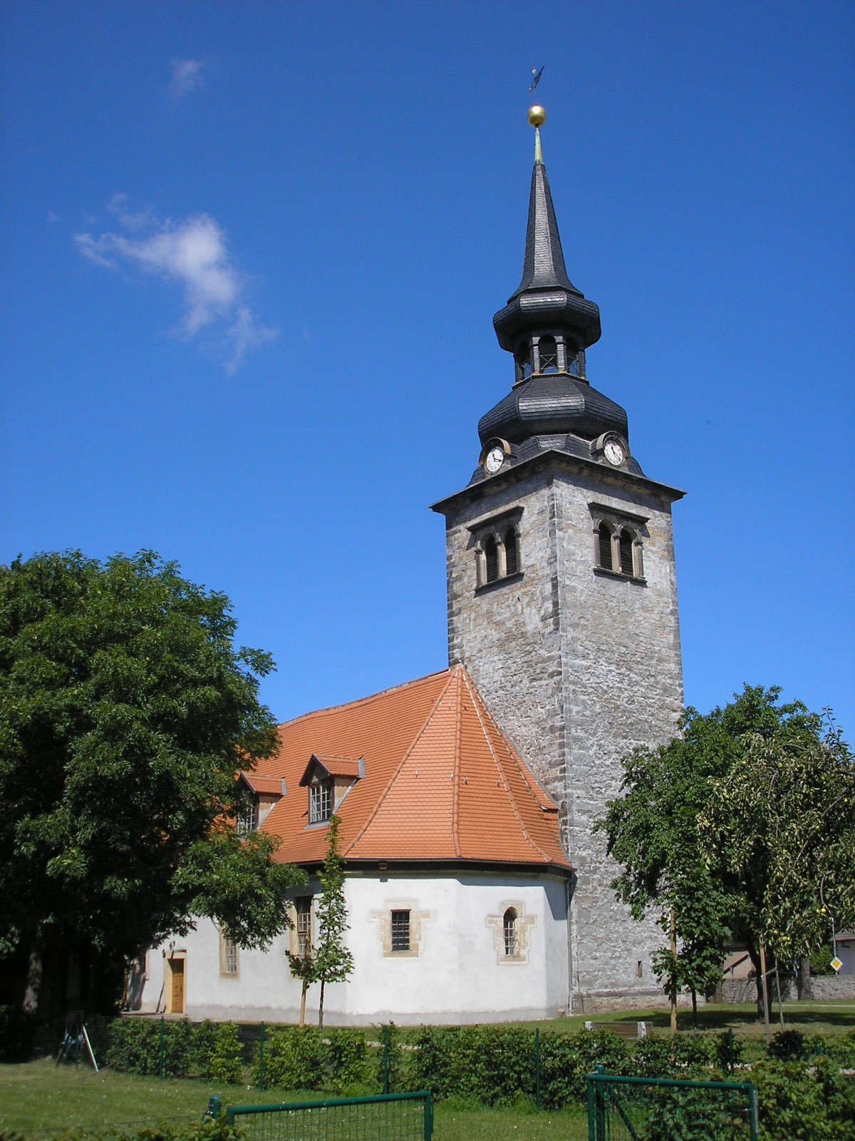 Die Dorfkirche von Mittelhausen bei Erfurt (Thüringen).